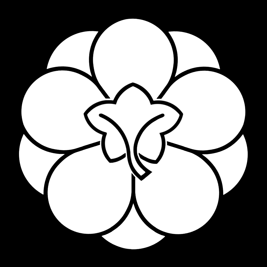 「八重裏梅」紋（染抜）